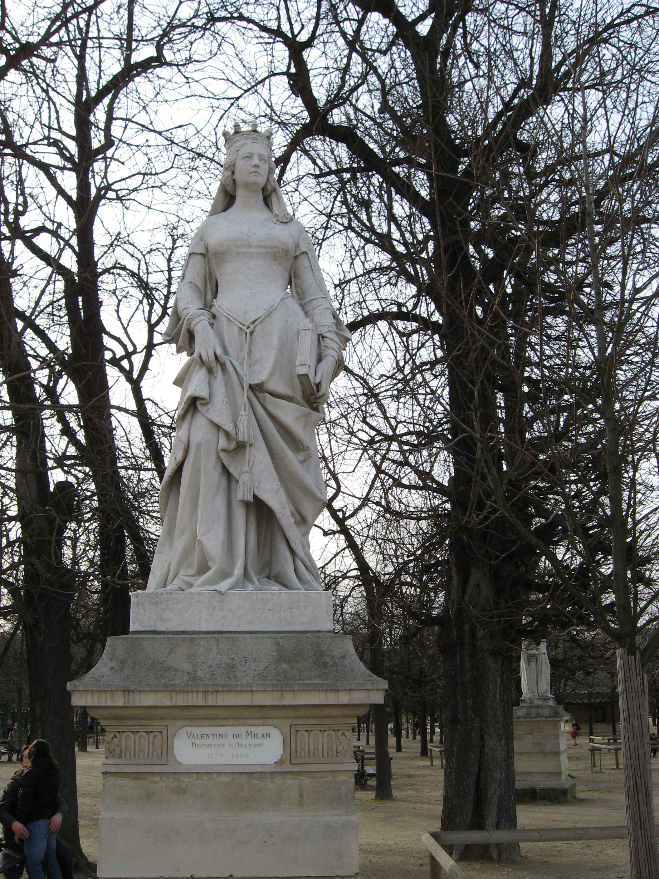 Valentine de Milan, Duchesse d'Orléans (1370-1408)